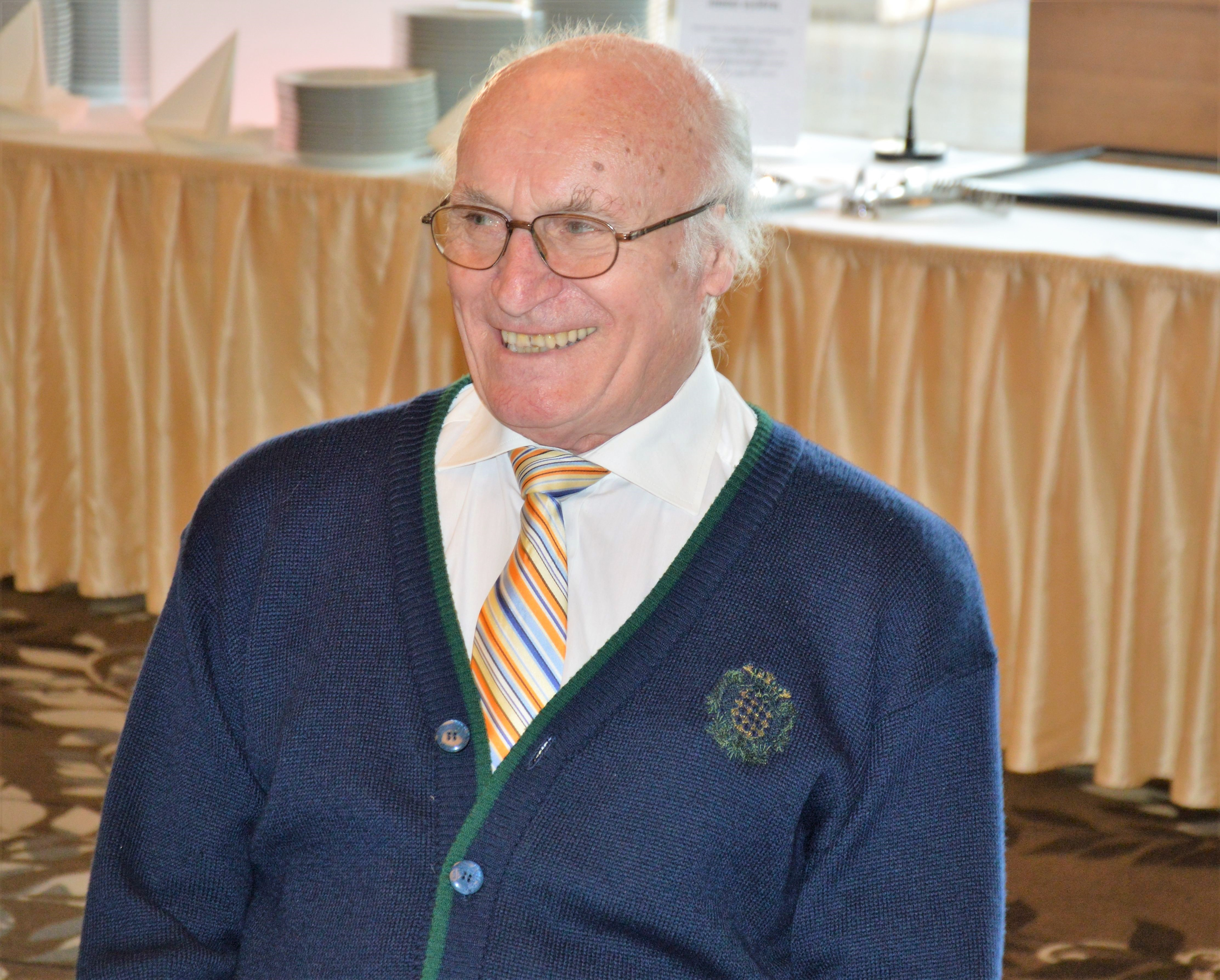 Kulcsár Gergely olimpiai ezüst- és bronzérmes gerelyhajító, edző